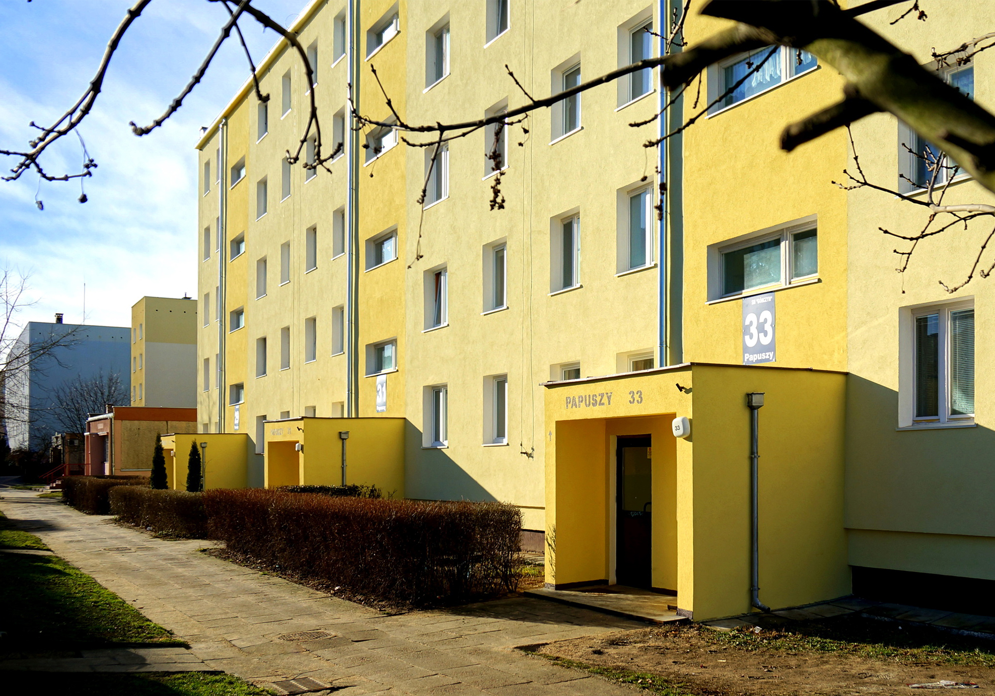 Gorzów Wlkp. Ulica Papuszy na Osiedlu Parkowym w dzielnicy Górczyn.